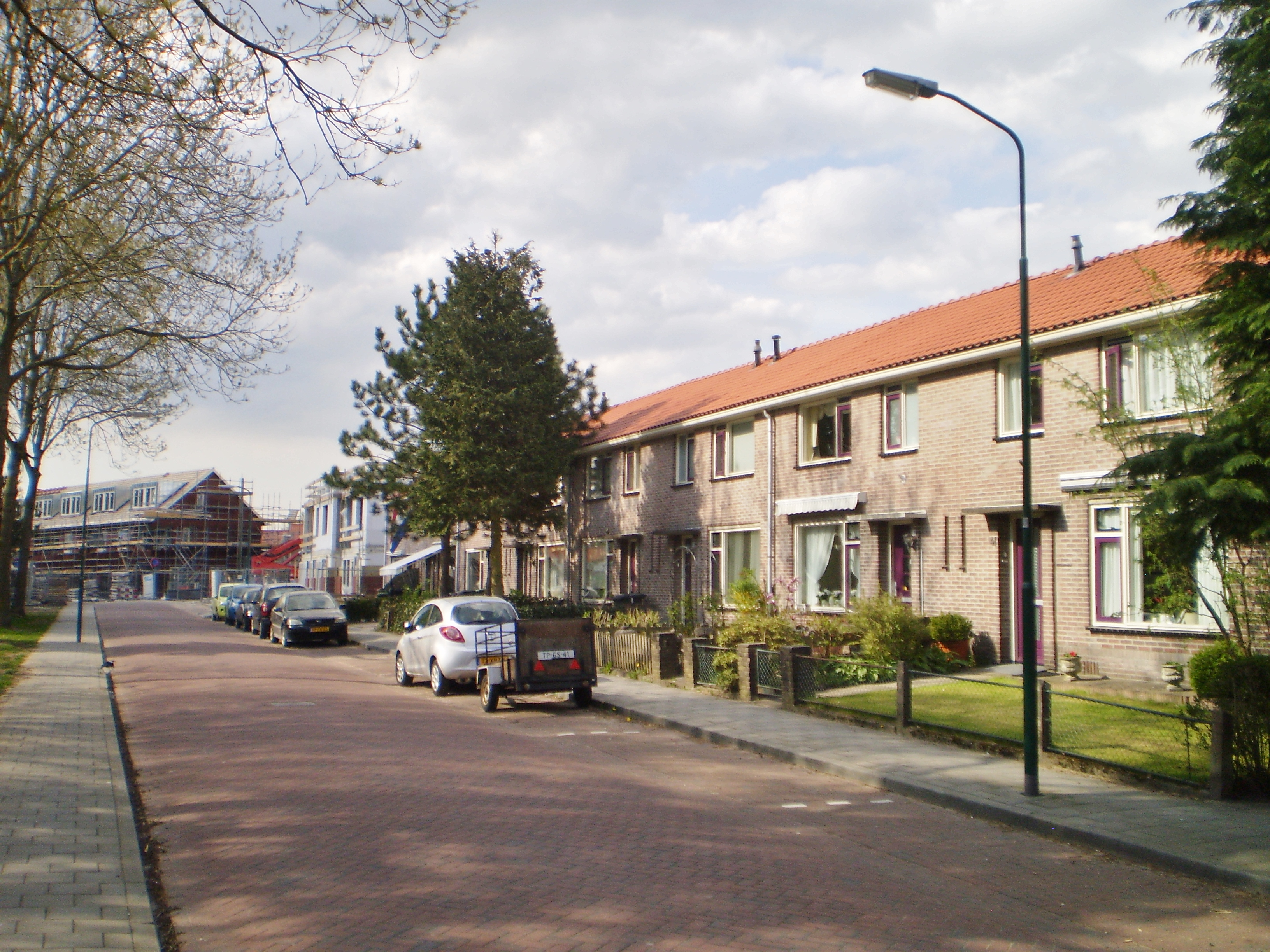 Lepelaarstraat tijdens nieuwbouw. Aan de overkant van de straat de begraafplaats